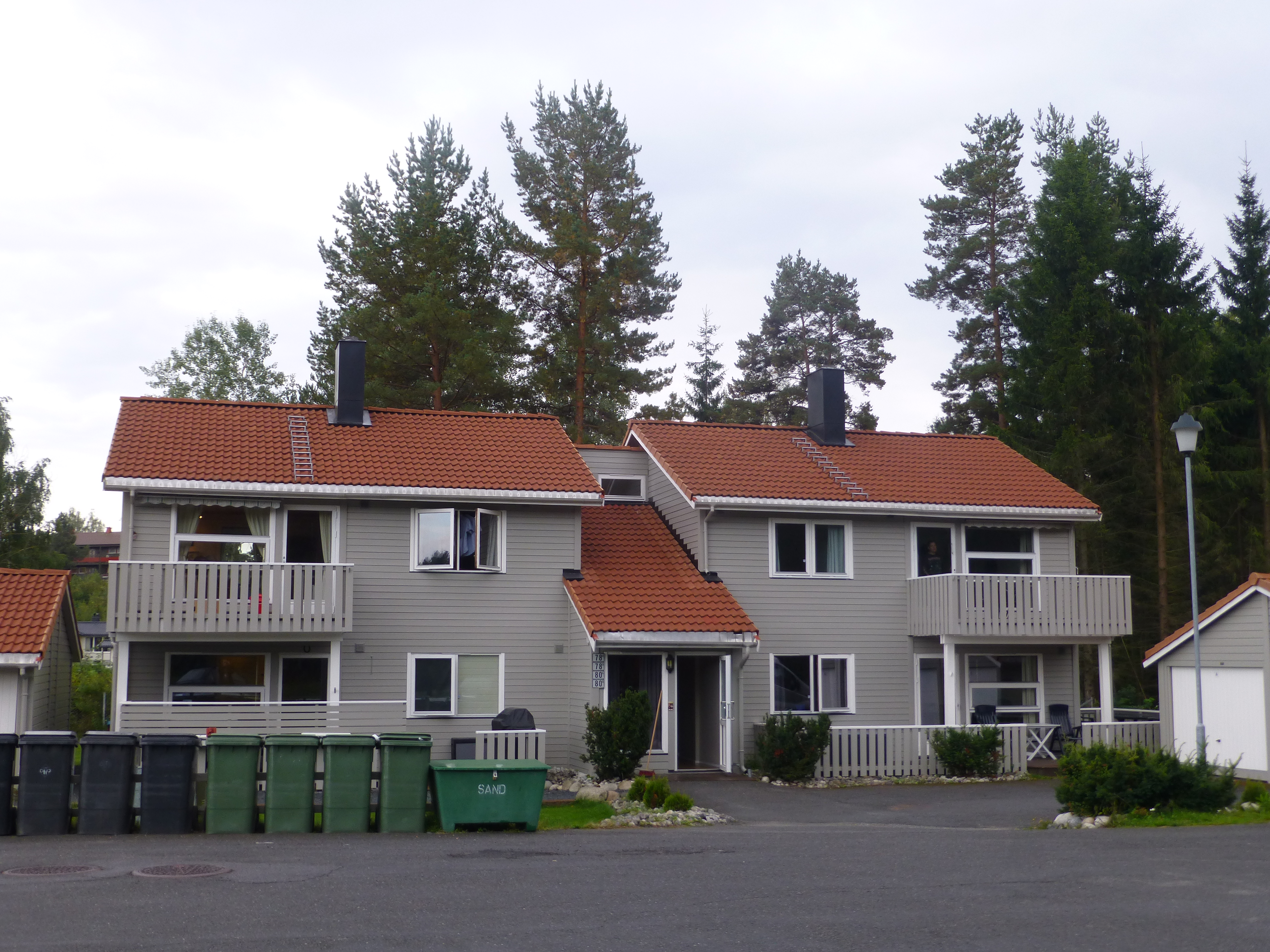 PU-boliger i Sagatun borettslag (RINGBO), i Hønefoss, Ringerike, Norge.